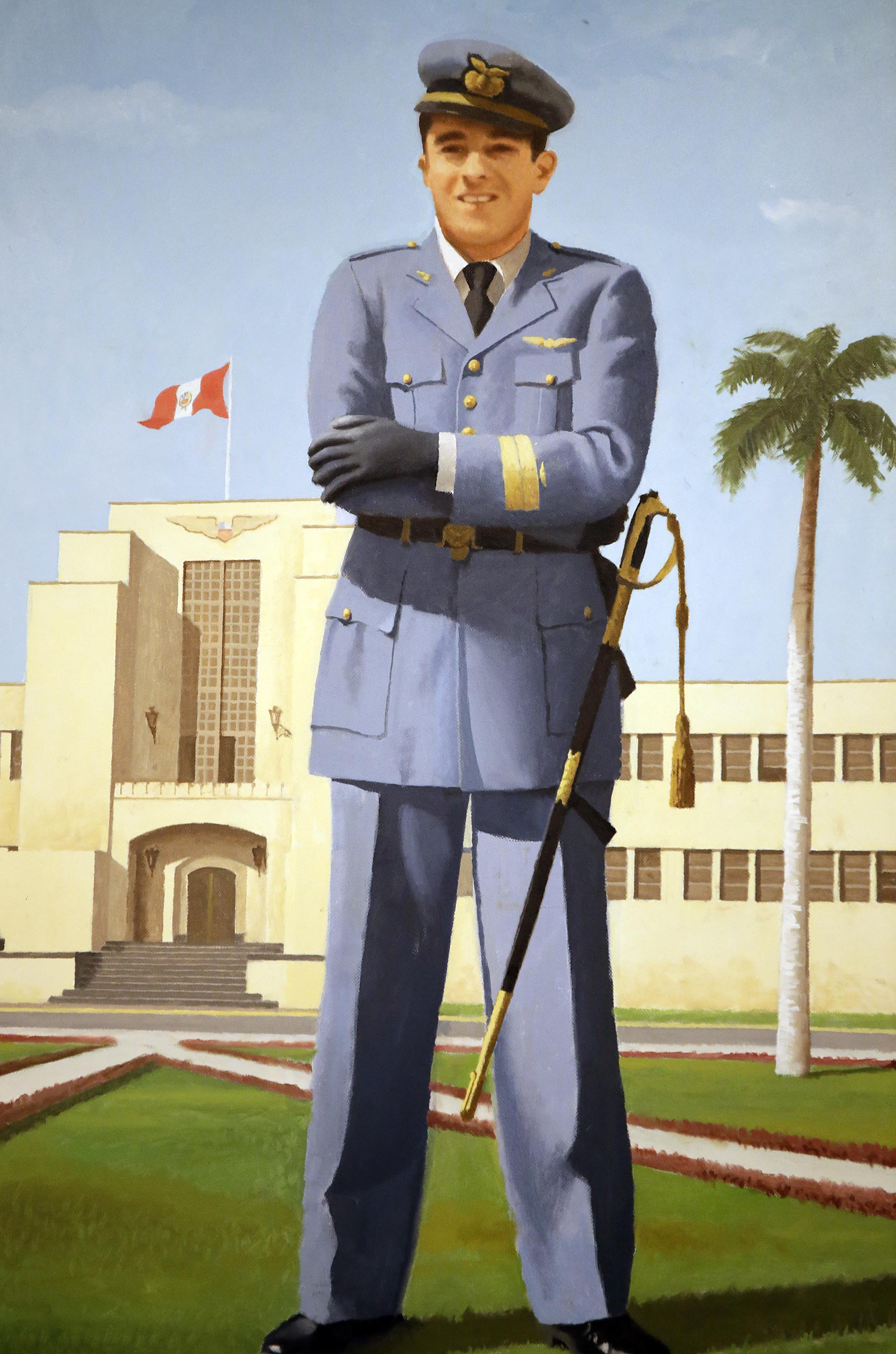 El ministro de Defensa, Pedro Cateriano Bellido, acompañado del comandante general de la Fuerza Aérea del Perú, Jaime Figueroa Olivos, realizó una visita de trabajo al Grupo Aéreo Nº 6 en la ciudad de Chiclayo. El titular del sector aprovechó la ocasión para develar un cuadro del héroe nacional, Gran General del Aire del Perú José Abelardo Quiñones, como parte de los homenajes por el centenario de su nacimiento. El óleo es obra del reconocido artista nacional Bill Caro y fue donado por el Instituto de Cultura y Política. Su directora María Dolores Camarero Cisneros participó en la ceremonia.